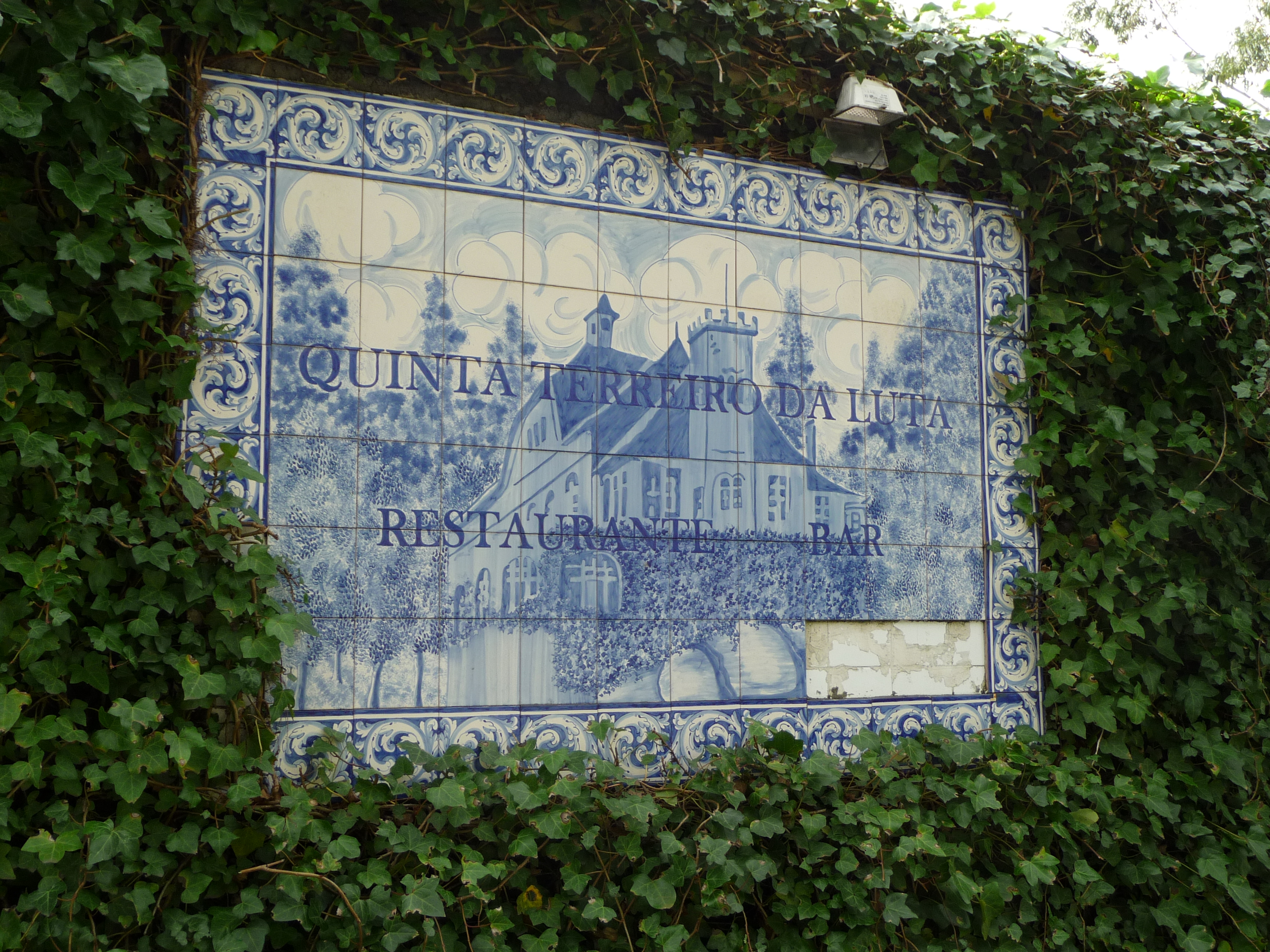 Azulejo az egykor Funchal és Terreiro da Luta között közlekedett fogaskerekű vasút fölső végállomásának képével (Terreiro da Luta, Madeira)